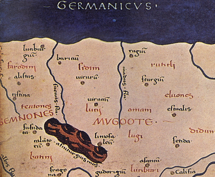 Der Ortsname "ROUGION" (hier rugίῦ), Detailbild von der Karte zur Germania magna.